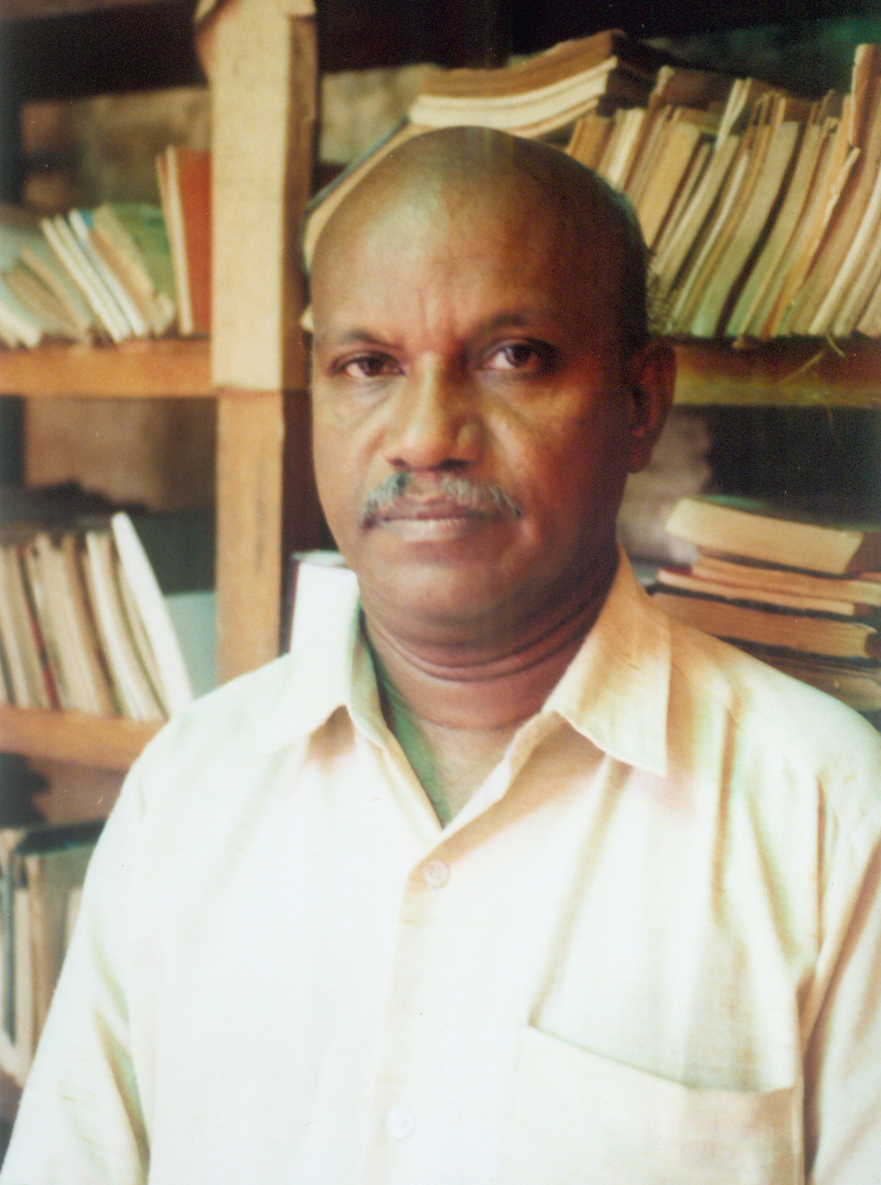 ശ്രീനിപട്ടത്താനം